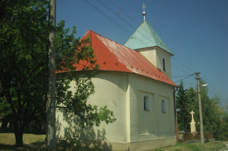 Rozbehy